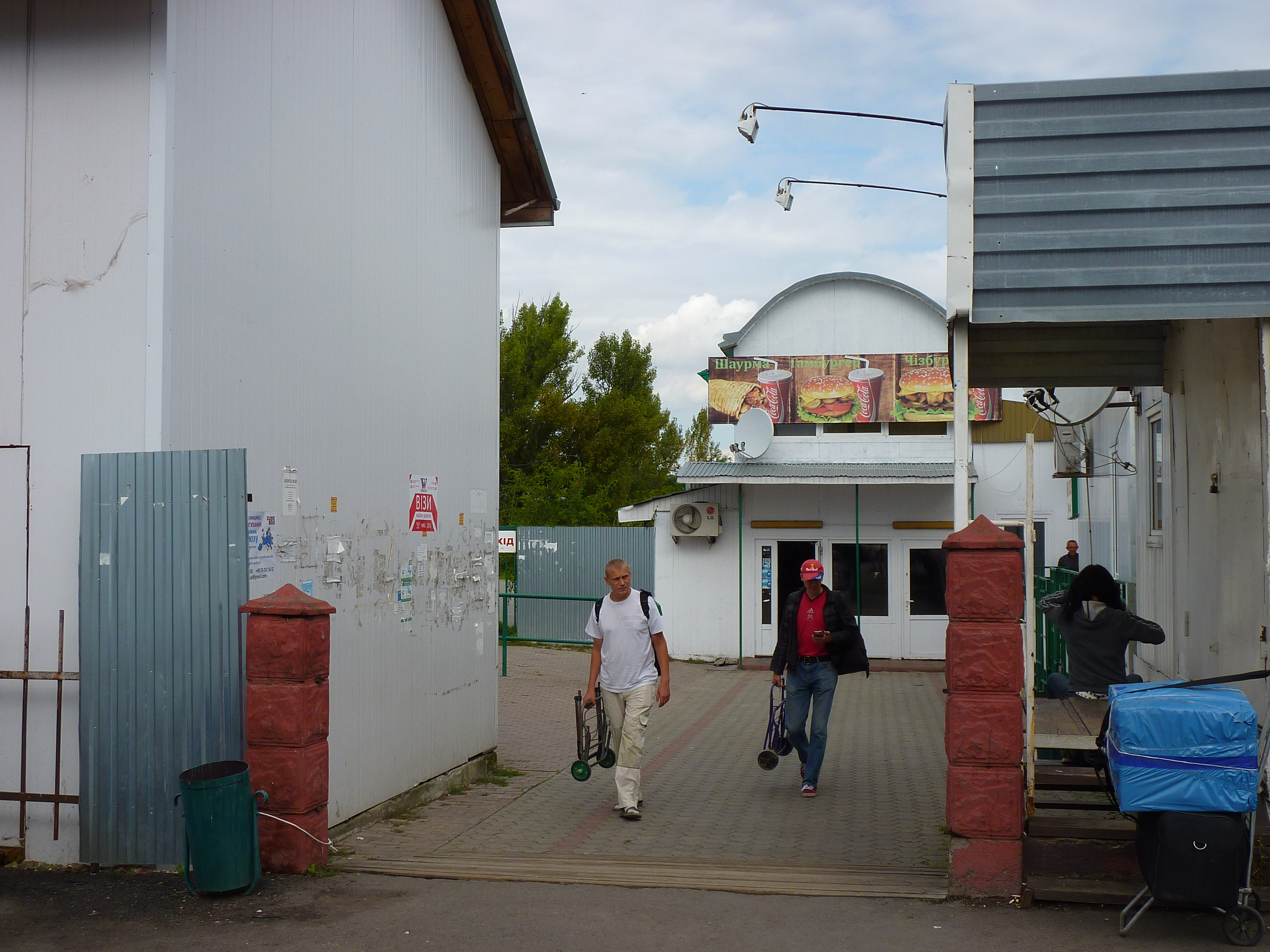 Niepozorne i nieoznakowane wejście na przejście graniczne Szeginie-Medyka dla ruchu pieszego i rowerowego. Skręt na prawo od drogi M11 przed przejściem Szeginia-Medyka dla ruchu samochodowego.